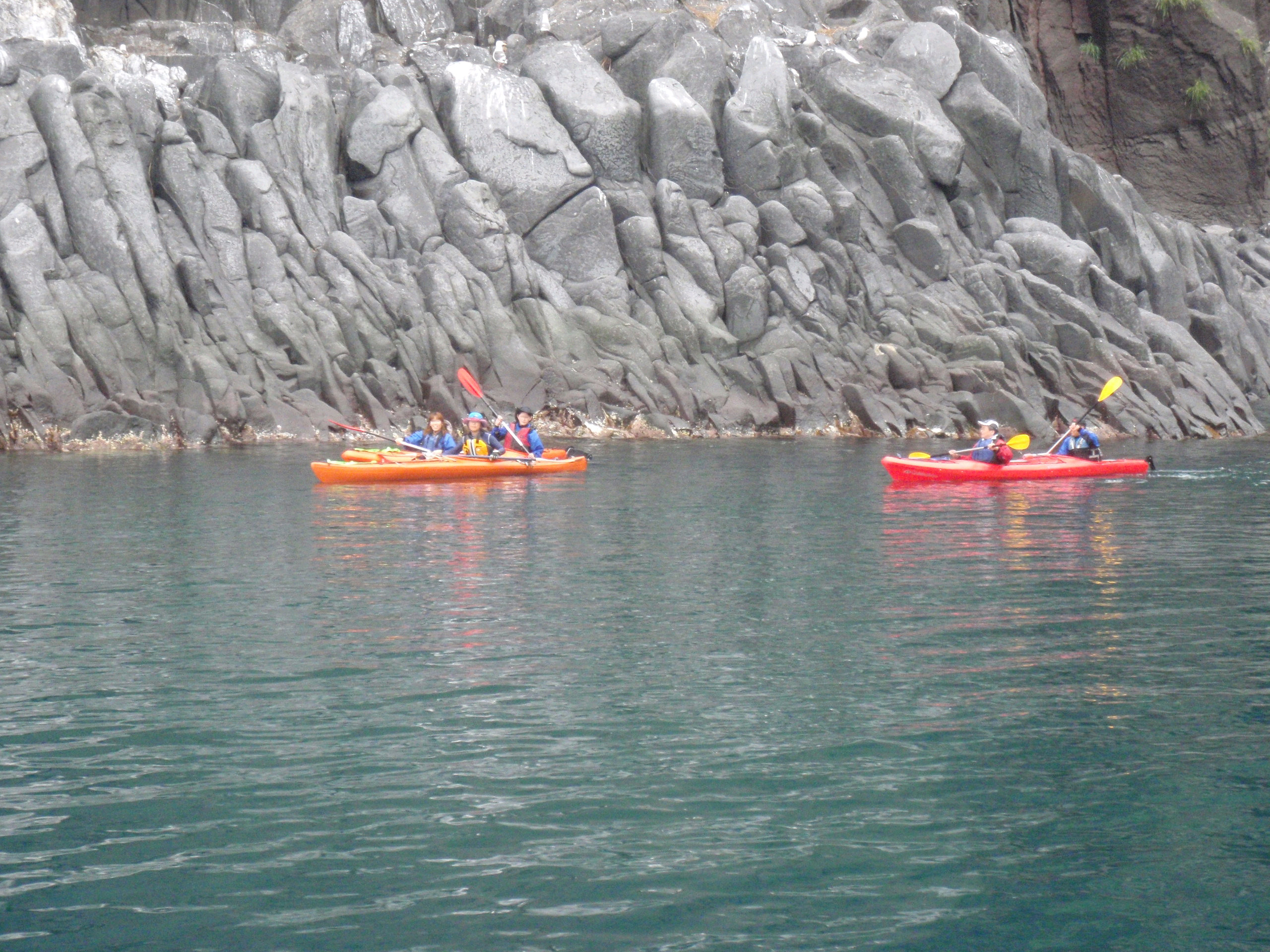 知床岩尾別ユースホステル主催のシーカヤックツアー。フレペの滝付近の海岸。知床観光船から撮影。目にぼかし修正入れる。